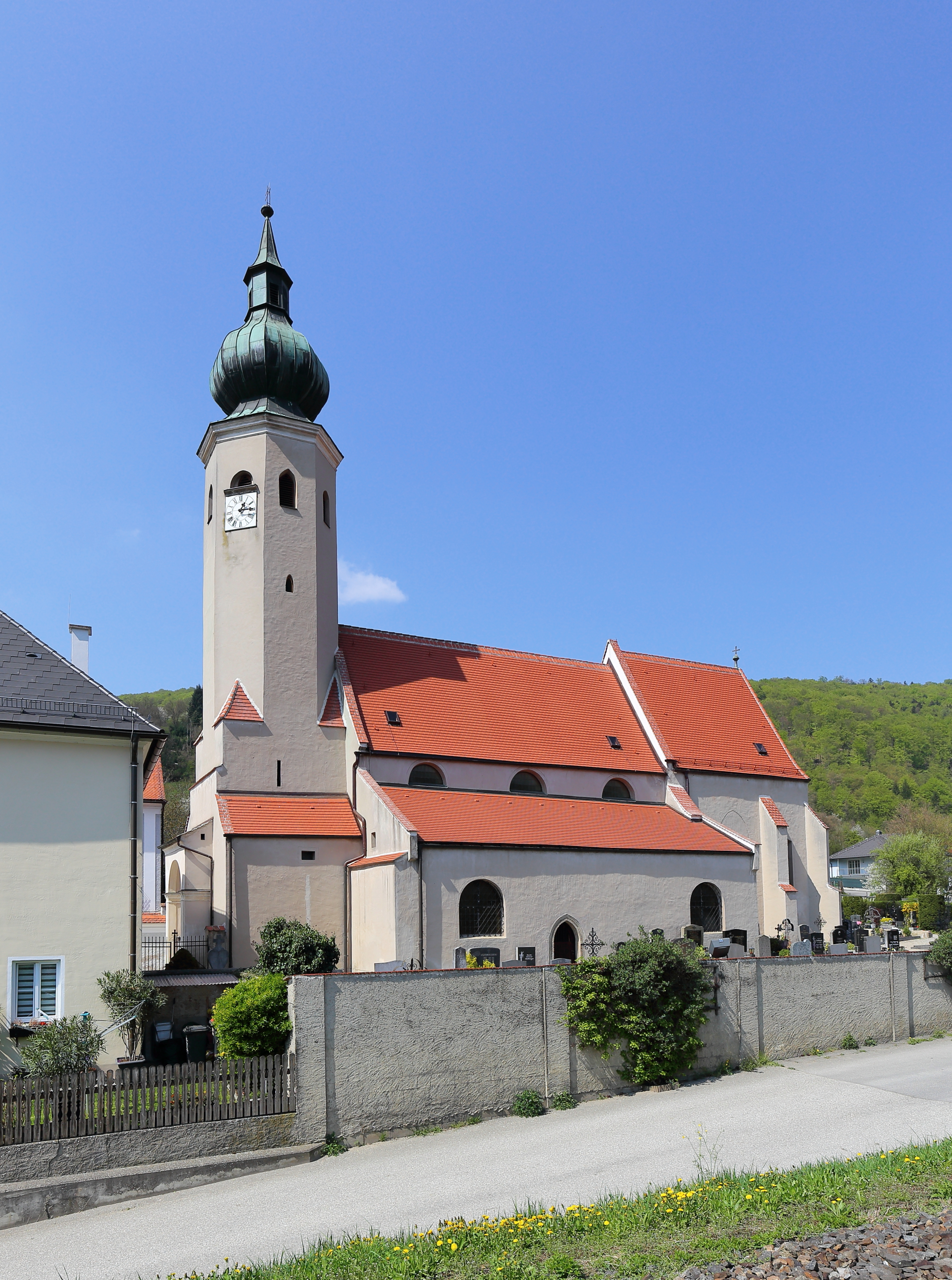 Südostansicht der römisch-katholischen Pfarrkirche Mariae Himmelfahrt in Aggsbach Markt, ein Ortsteil der niederösterreichischen Marktgemeinde Aggsbach. Eine spätromanische, dreischiffige Basilika mit gotischem Gewölbe und Chor, die 1779 barockisiert wurde.